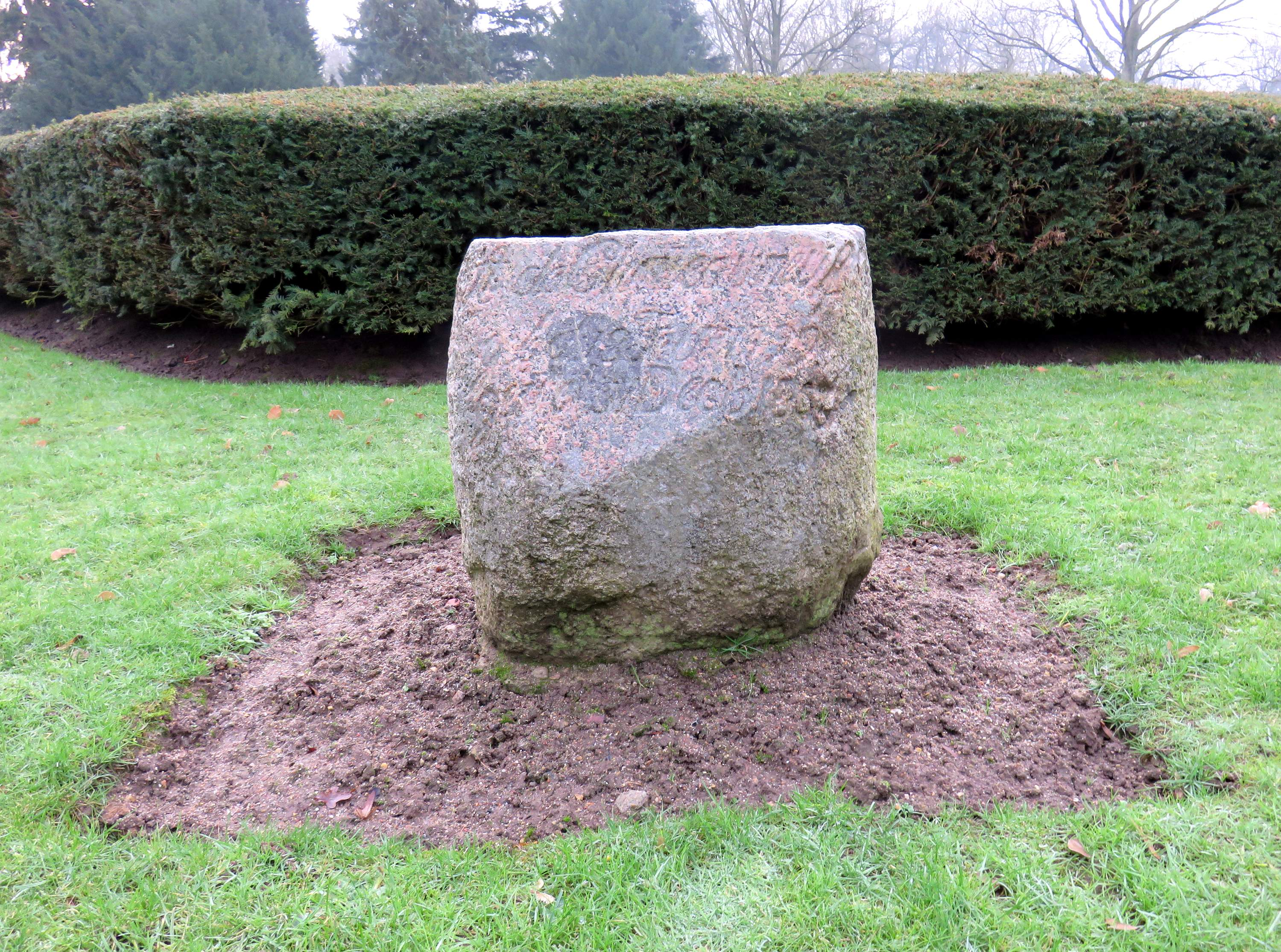 Grabmal zu Ehren des Hamburger Baumeisters Alexis de Chateauneuf im Bereich des Althamburgischen Gedächtnisfriedhofs auf dem Hamburger Friedhof Ohlsdorf, Kreuzungsbereich der beiden Achsen.